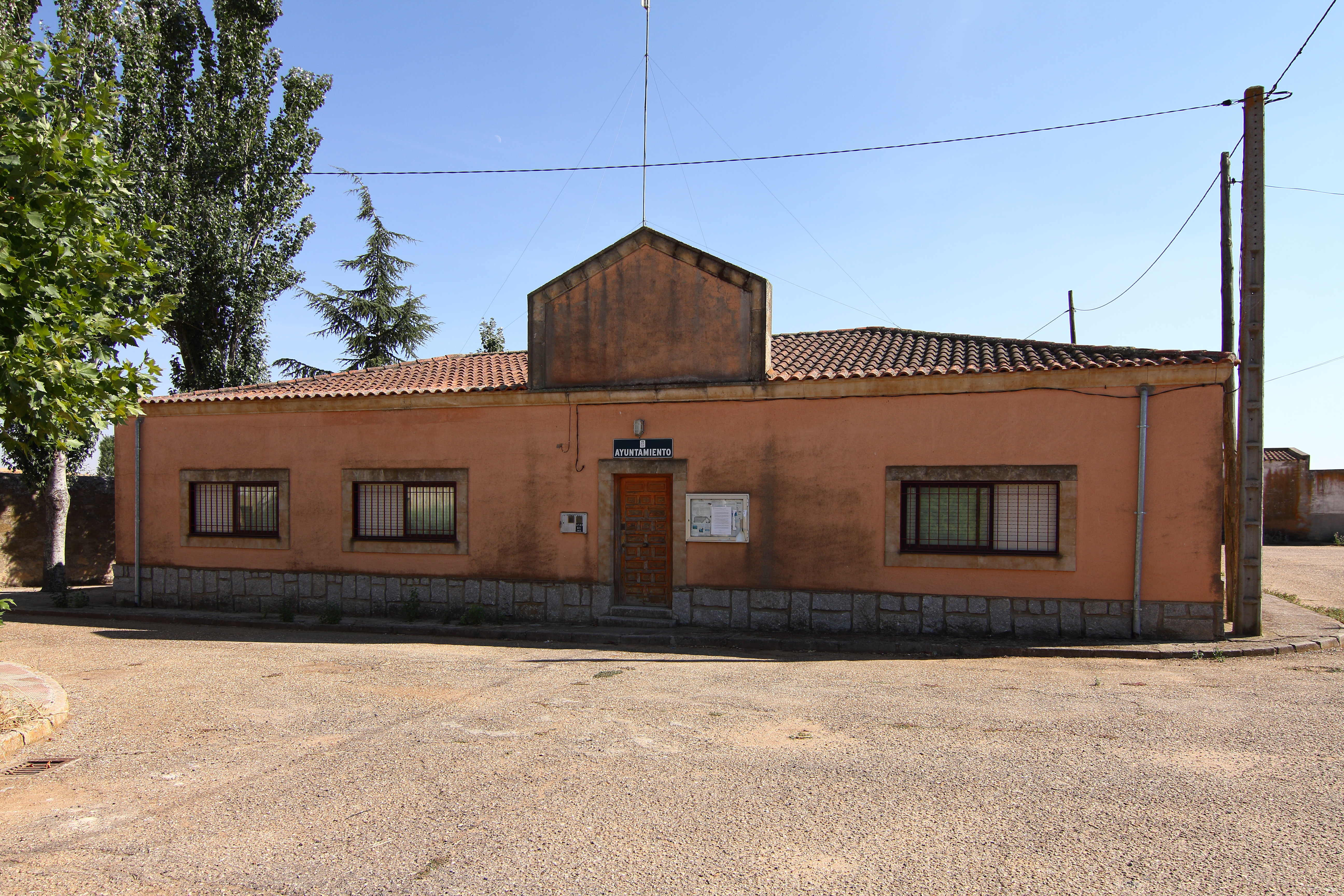 Ayuntamiento de Carrascal de Barregas